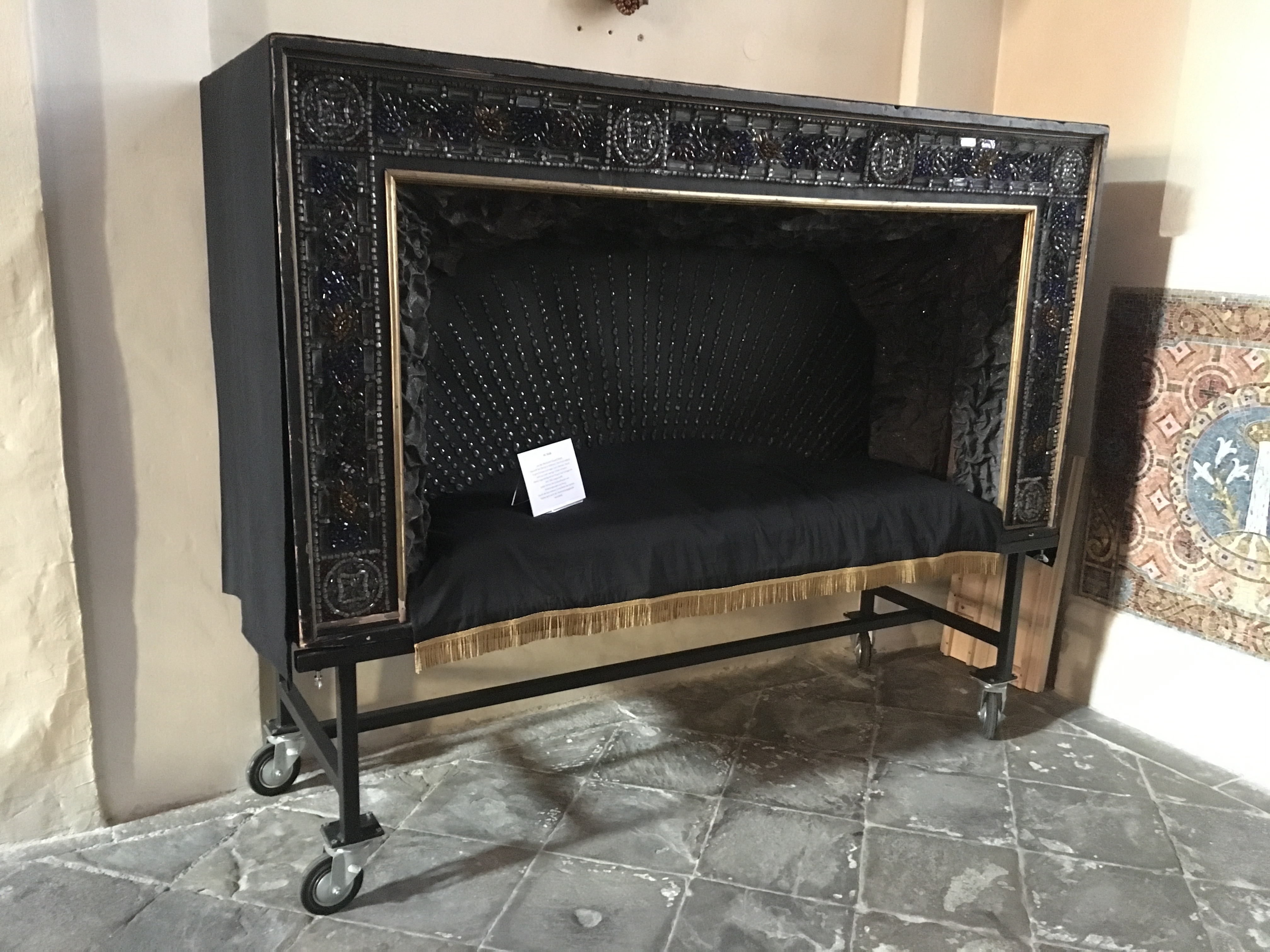 Heiliges Grab Scheibbs